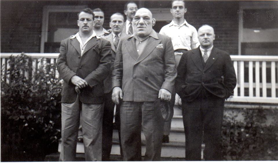 1936 :Chicoutimi: Le lutteur « l’ange » (Maurice Tillet) et Jim Roberts en visite!